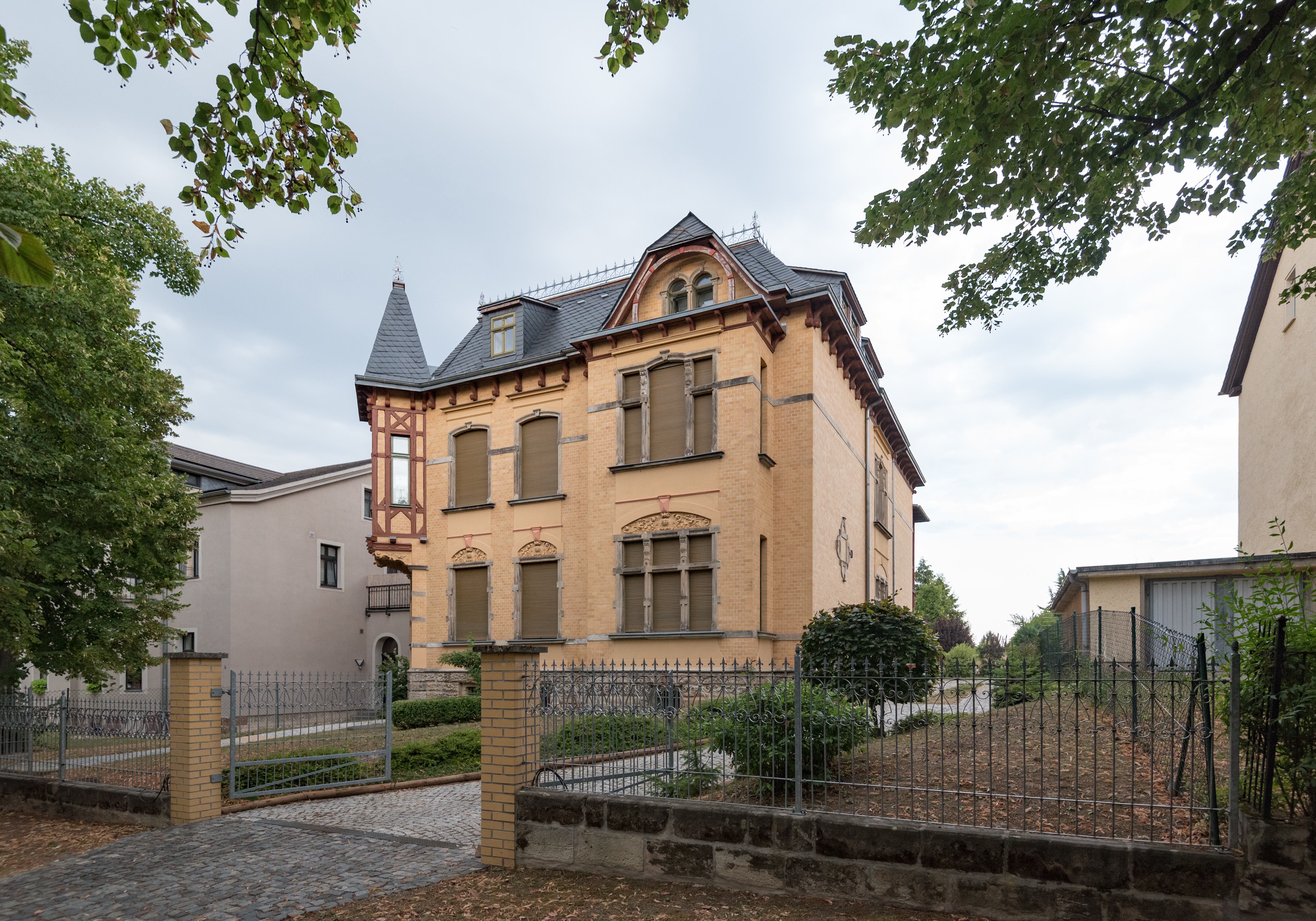 Naumburg (Saale), Luisenstraße 7